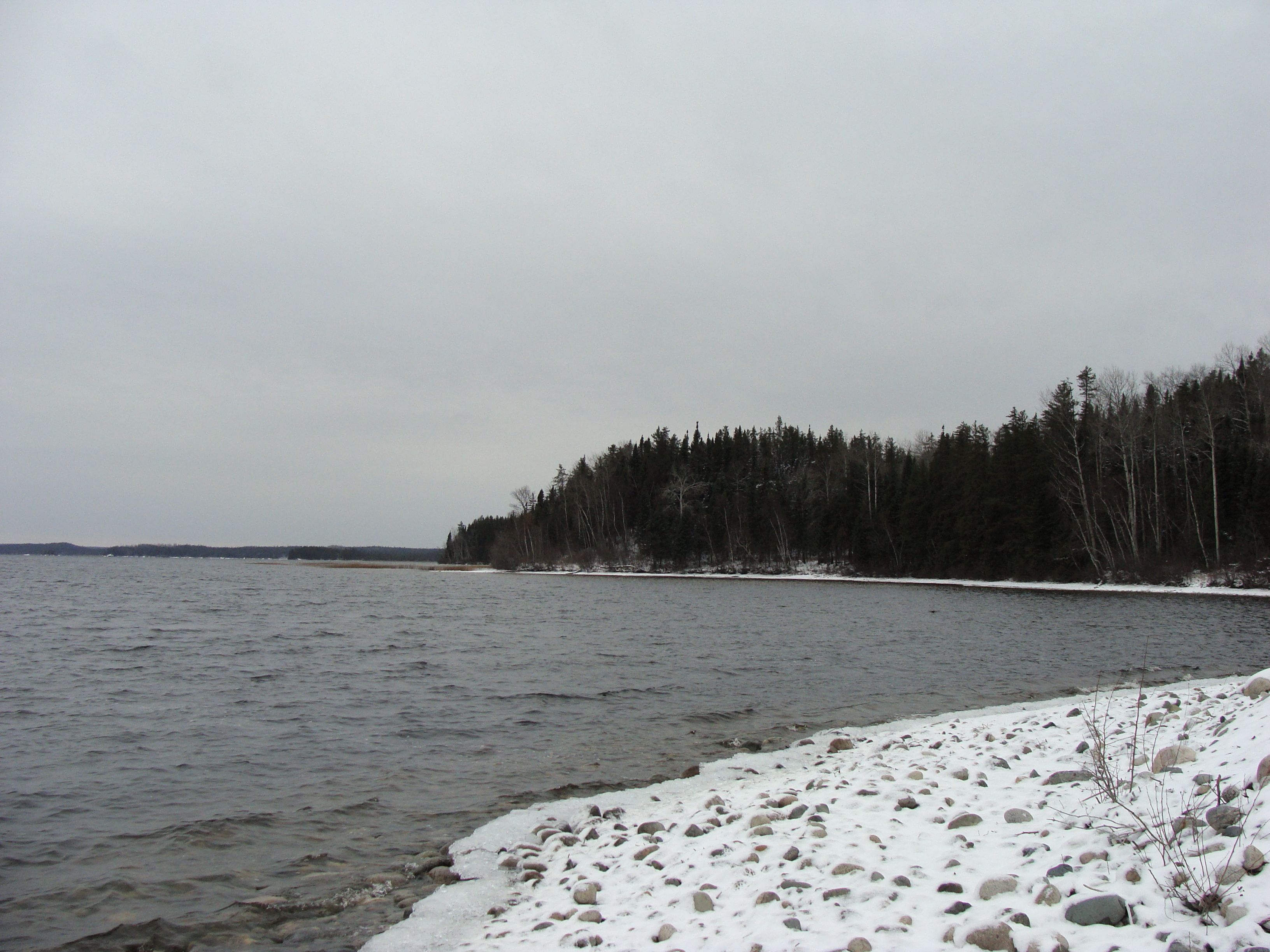 Lac de la Presqu'île, près de Chapais (Québec).